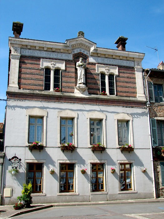 Châtillon-sur-Chalaronne, maison où vivait St. Vincent de Paul en 1617